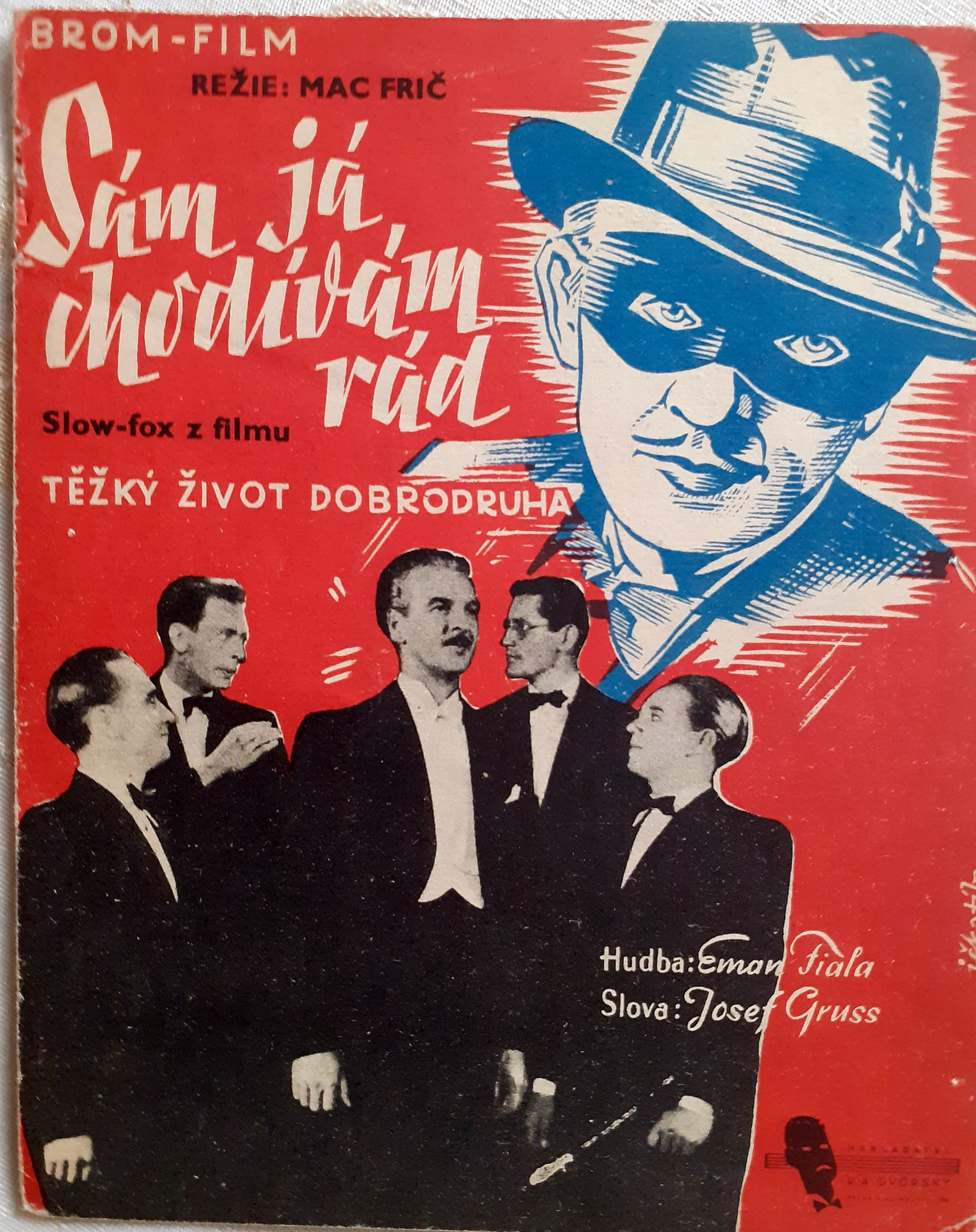 Notová úprava a text písně. Vydalo Nakladatelství R.A.Dvorský